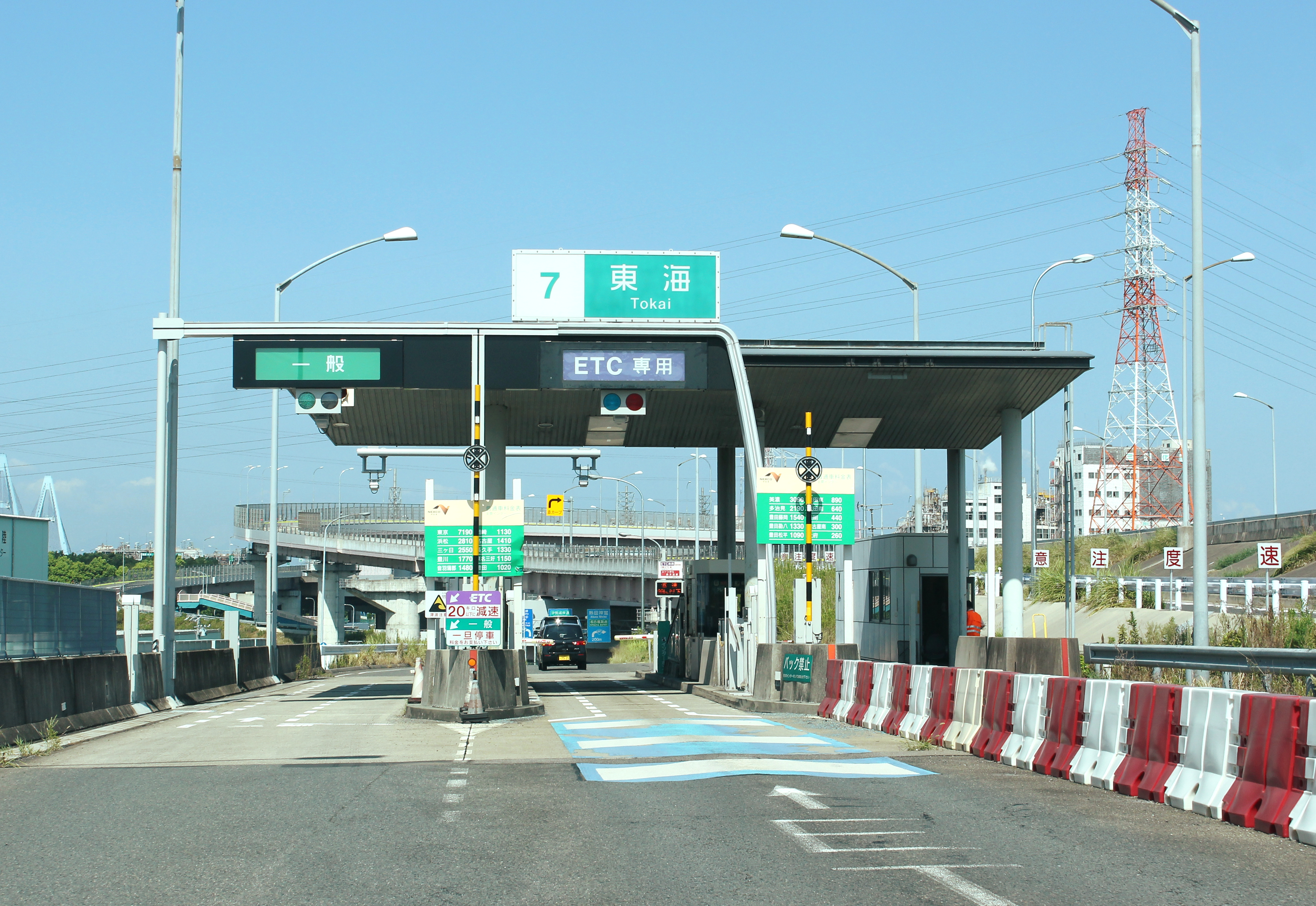 伊勢湾岸自動車道 東海IC出口料金所